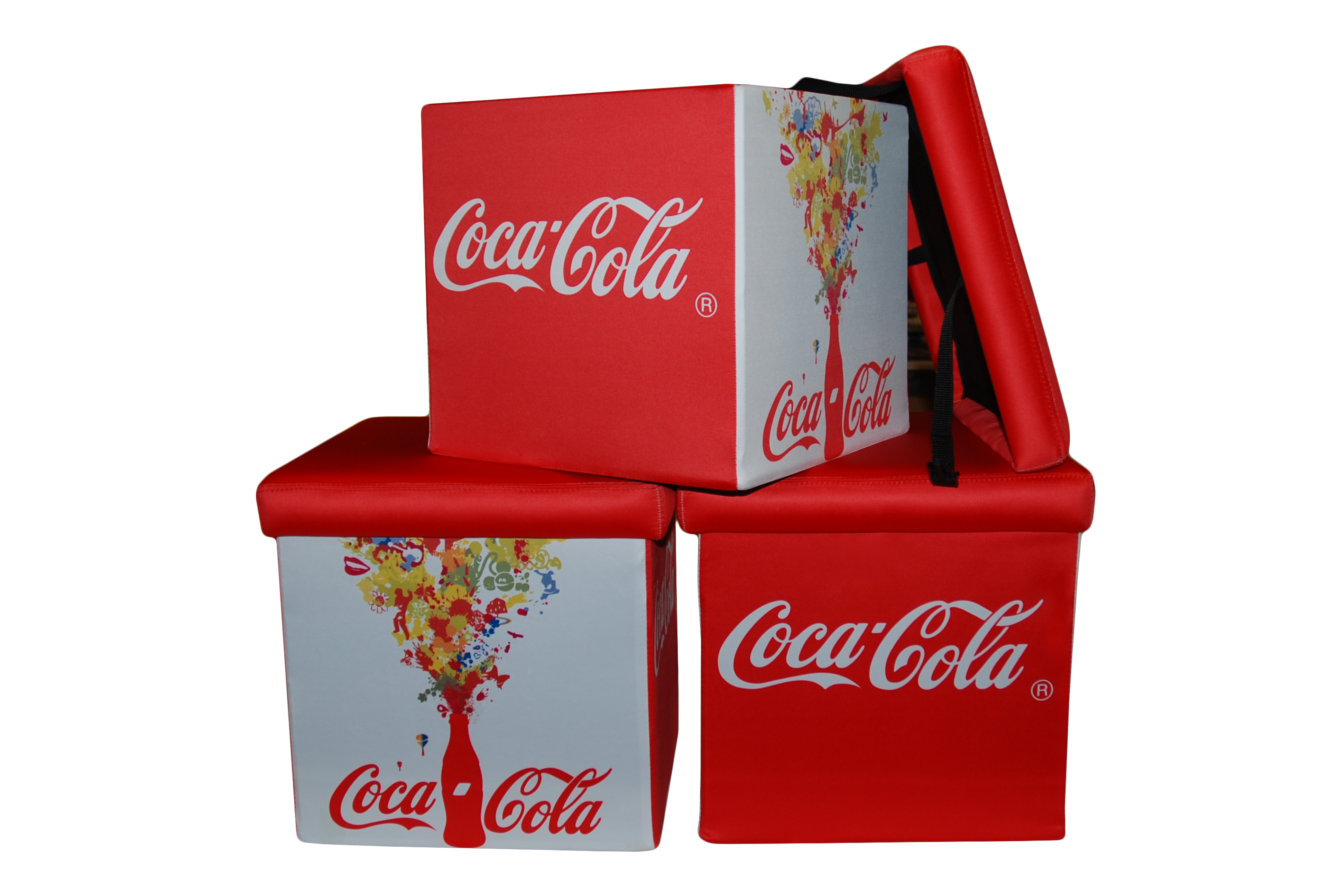 Współczesna reklama marki coca-cola na siedziskach kwadratowych